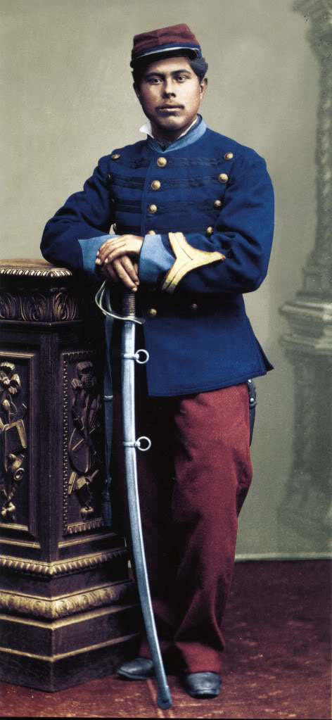 Cabo 1º A Farias del Regimiento " Carabineros de Yungay"